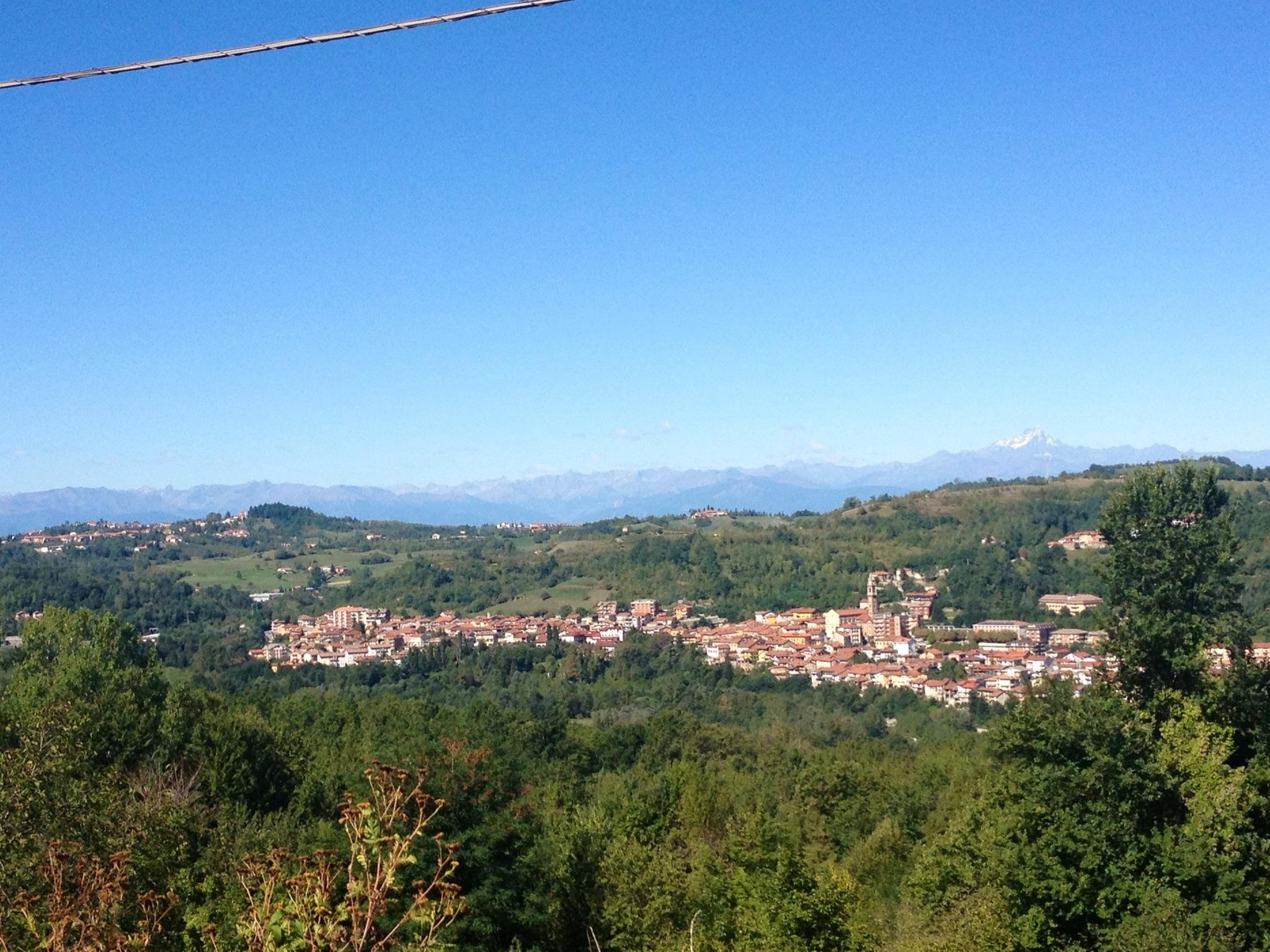 Vista di San Michele Mondovì dalla frazione San Paolo